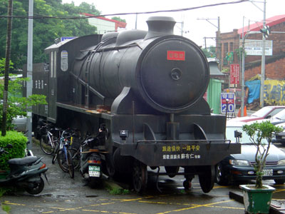 臺灣鐵路管理局鶯歌車站外展示的假蒸汽火車鶯歌號。